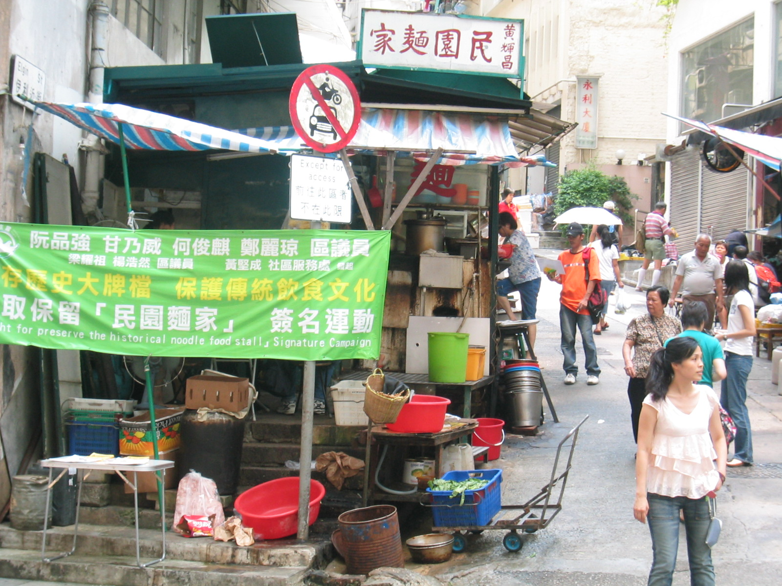 A dai pai dong at Central, Hong Kong